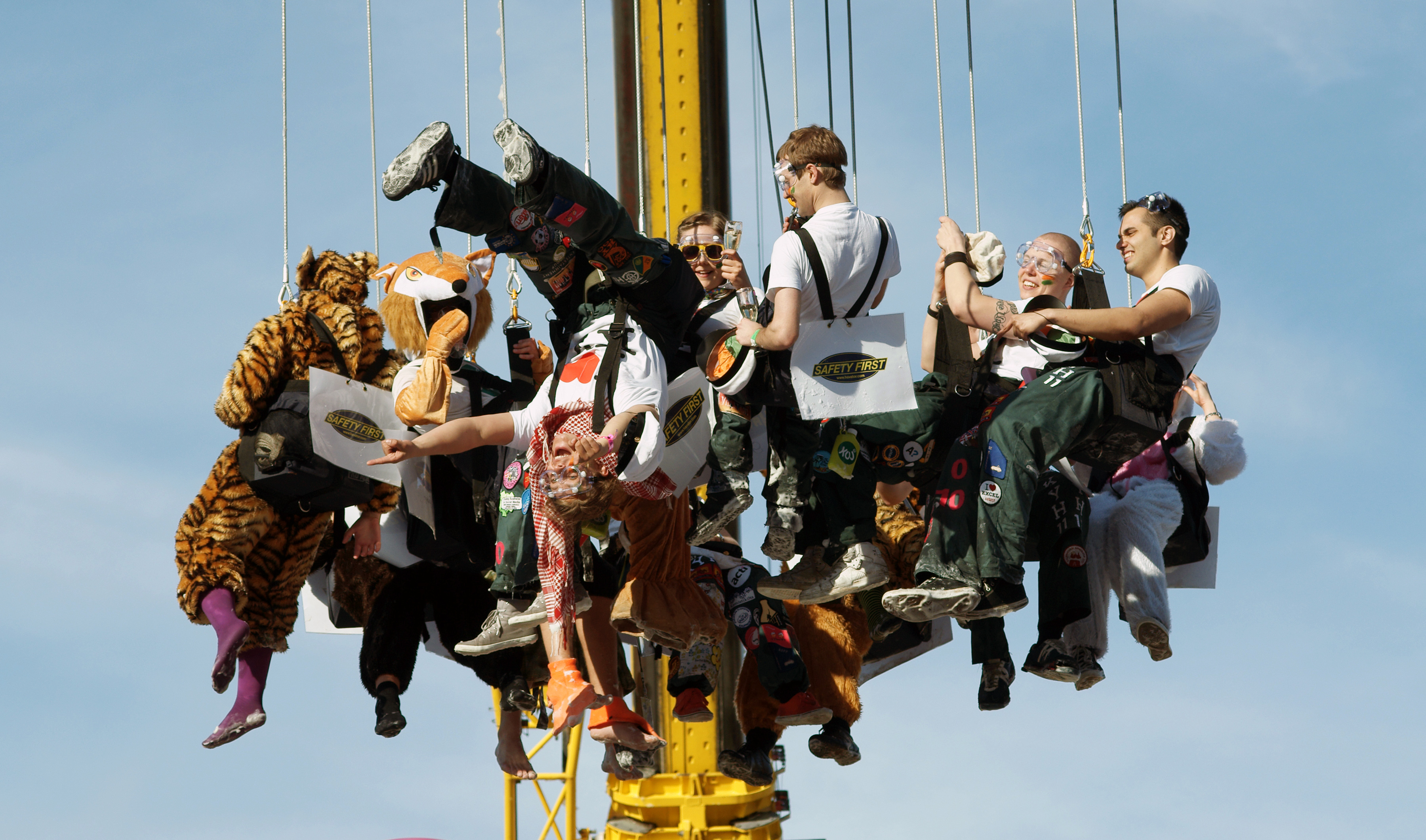 Mantan lakittajat vappuna 2011.